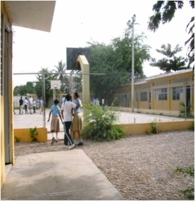 escuela publica de villa progreso I